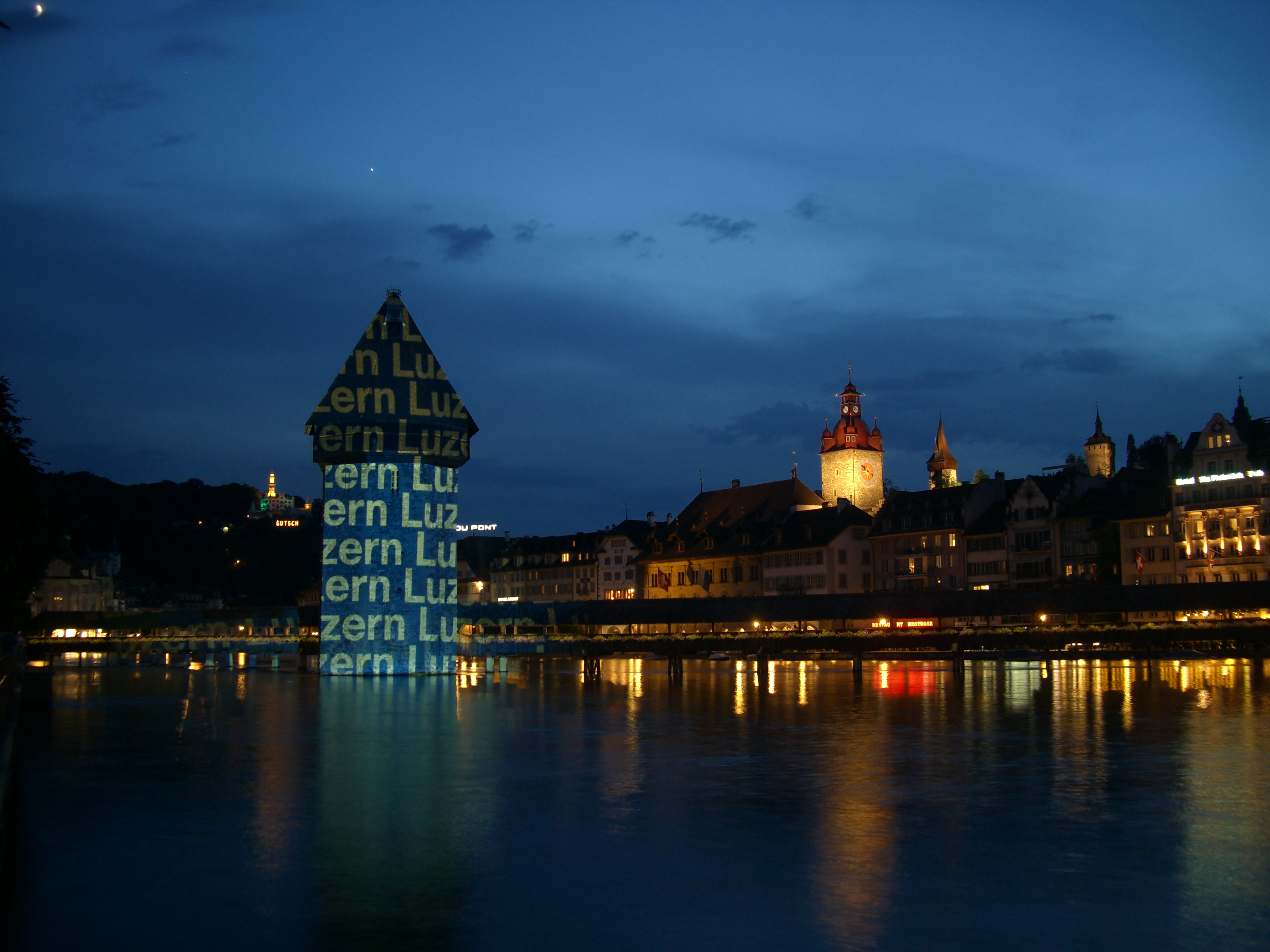 Luzern, Kapellbrücke bei Nacht mit Aufleuchtung